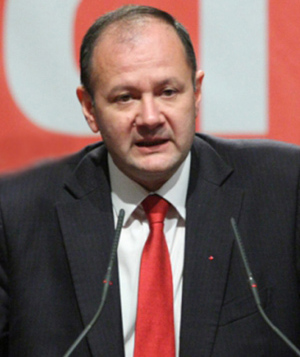 Портретна снимка на Михаил Миков